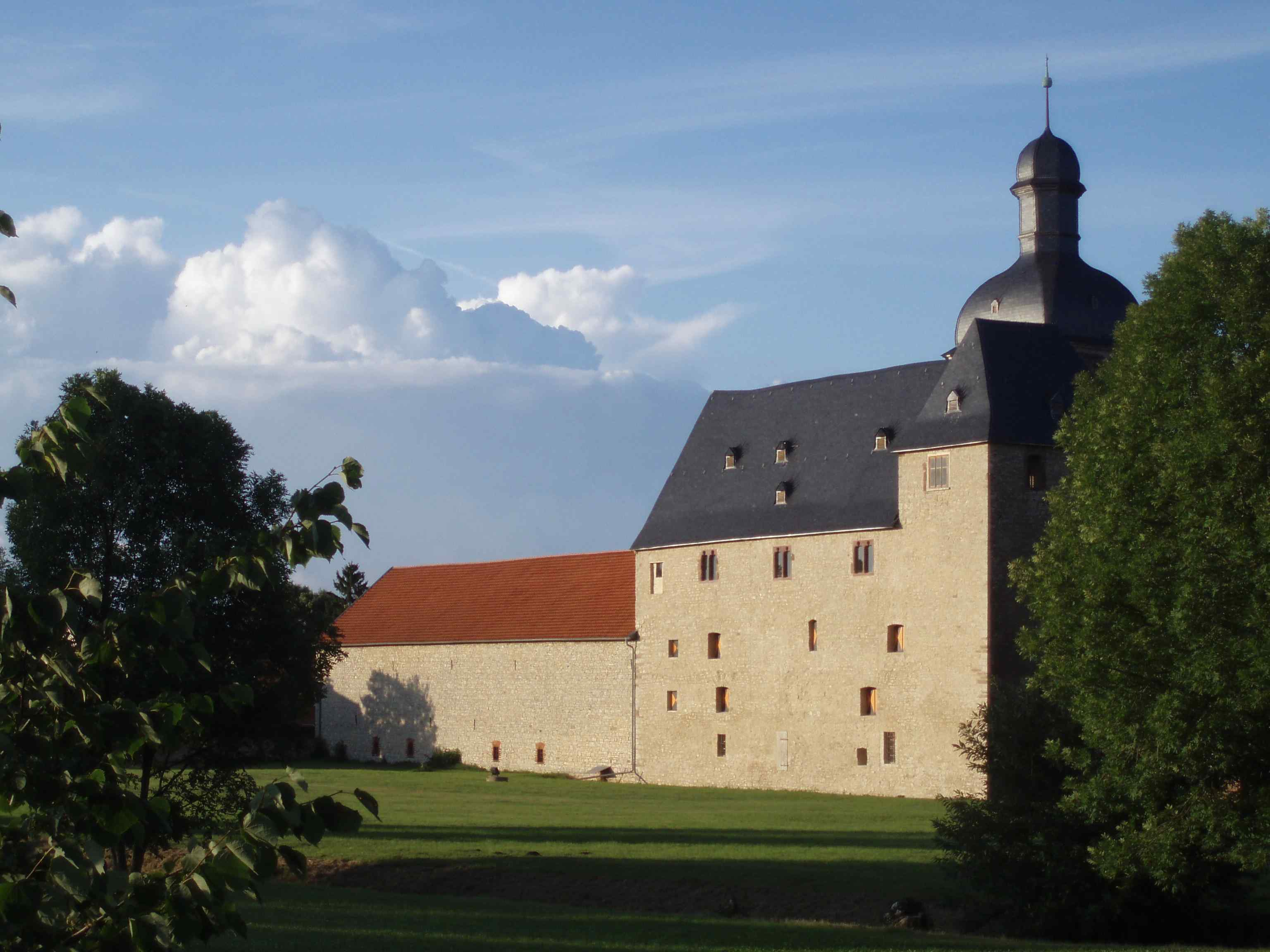 Burg Zilly